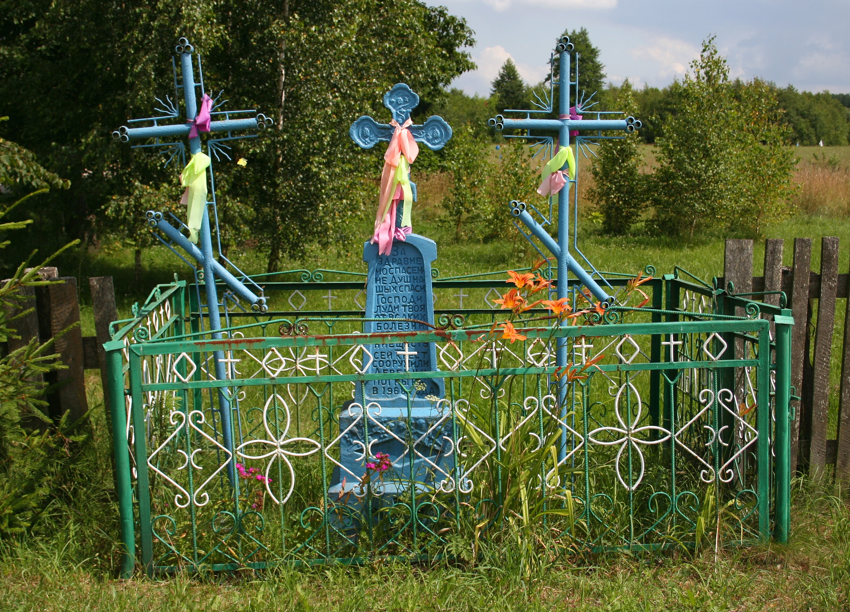 krzyże we wsi Pogreby, gmina Kleszczele, woj. podlaskie